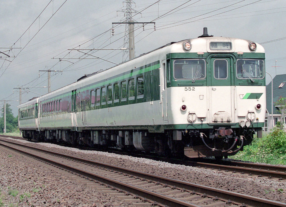 JR北海道キハ56系お座敷気動車 キハ56 552